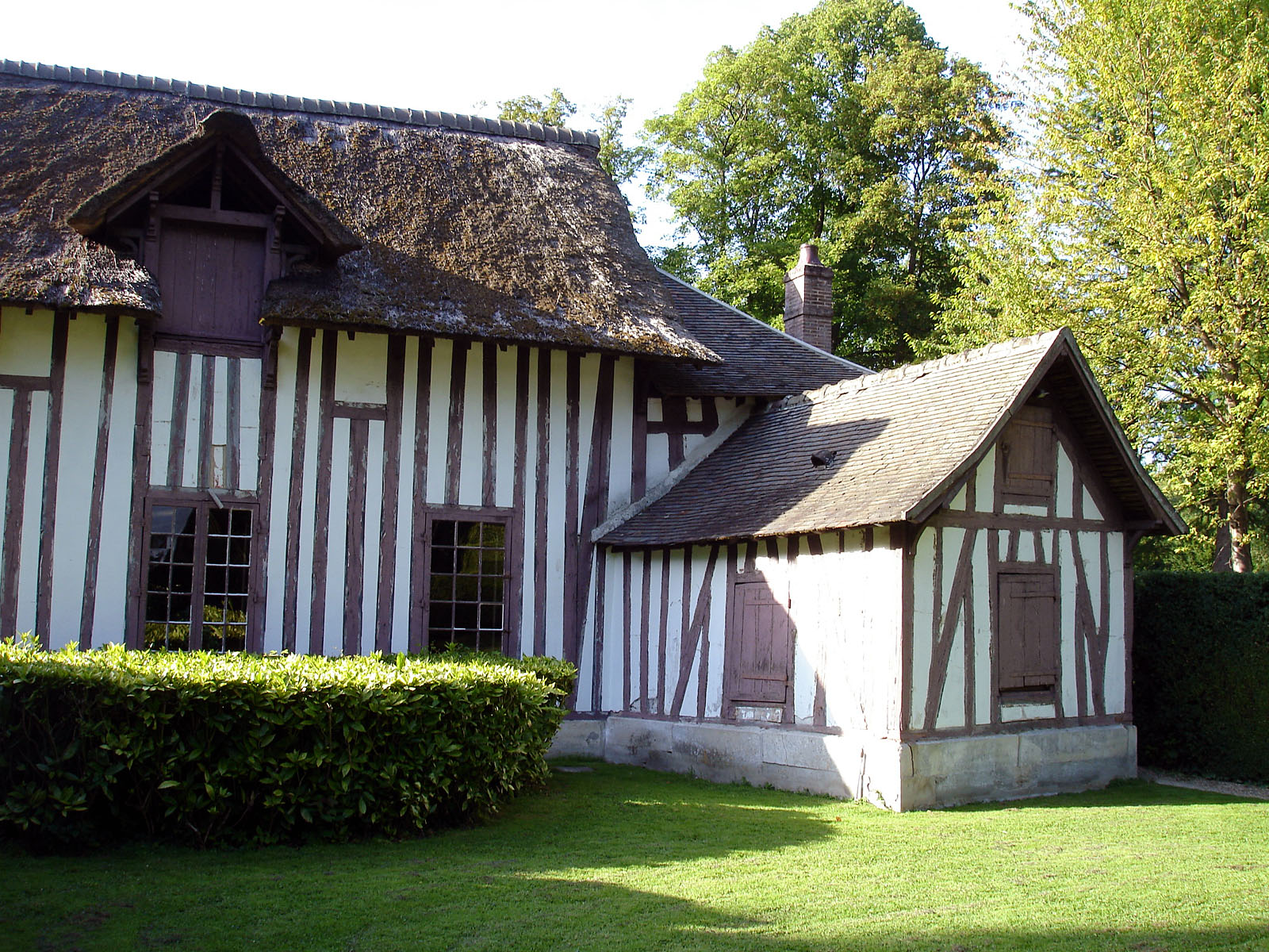 Maison du hameau, parc du château de Chantilly, France.